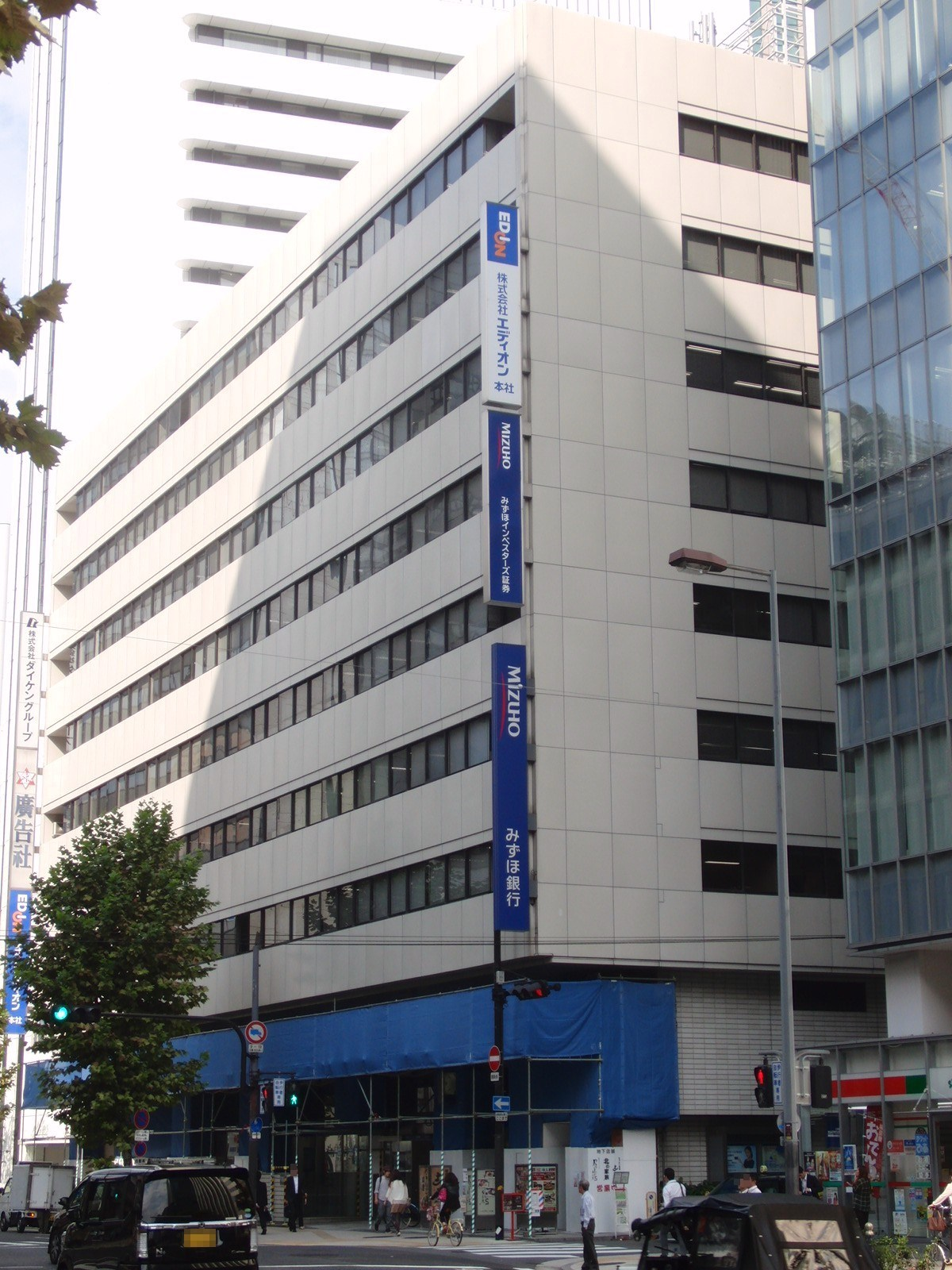 堂島グランドビルを撮影